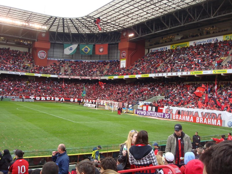 Descrição Arena da Baixada